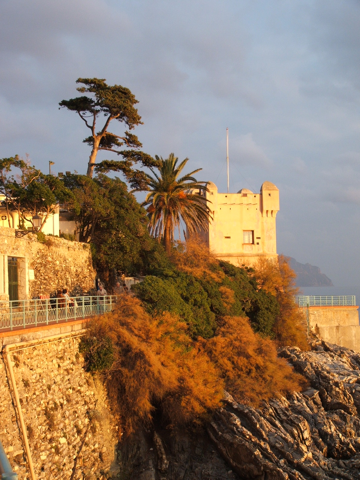 Immagine da Genova